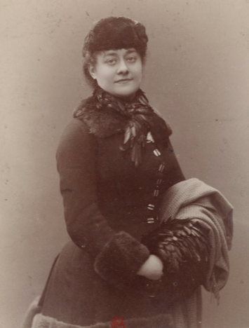 Marie Grisier-Montbazon actrice